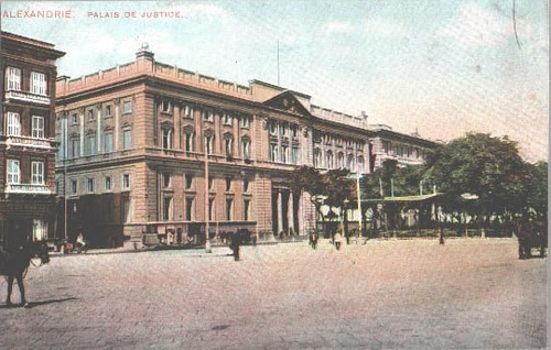 s.o.